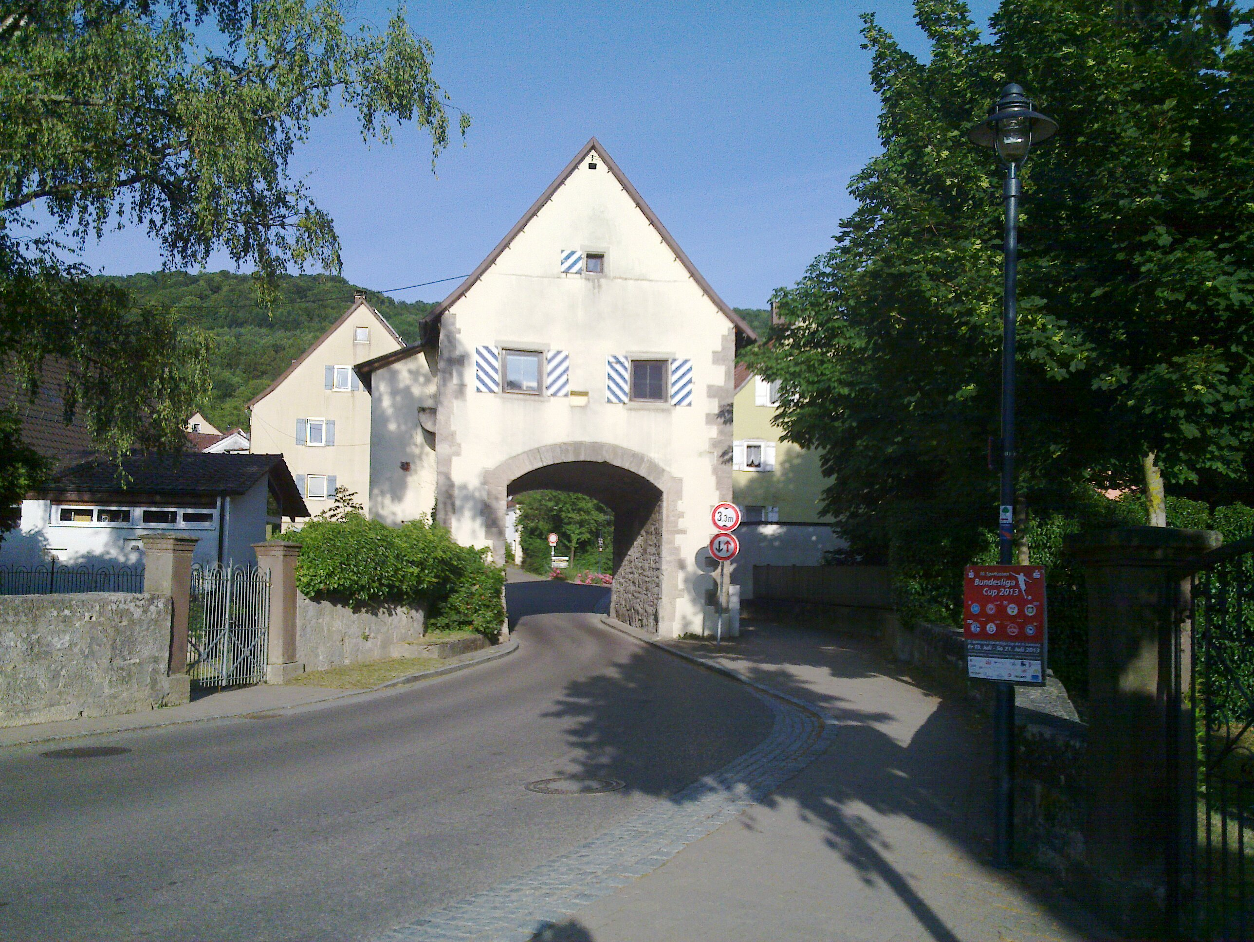 Stadttor in Braunsbach